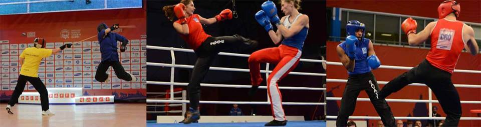 SAVATE CANNE-SAVATE ASSAUT- SAVATE COMBAT